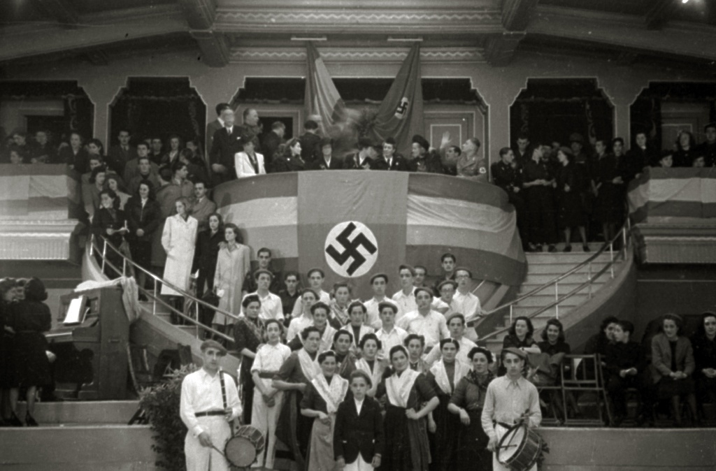 Título original: Acto de la Falange celebrado en un salón de La Perla del Océano (1/3) Localización: San Sebastián (Guipúzcoa)